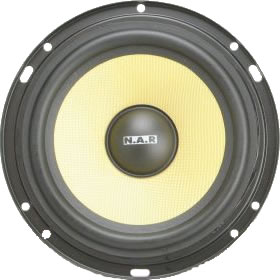 Imagem de exemplo de um mid-bass de 6" (seis polegadas) de diâmetro.